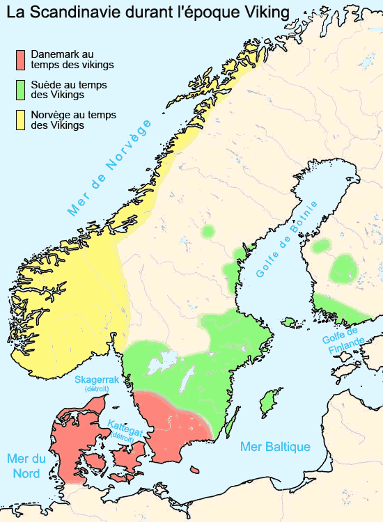 Skandinavien im Zeitalter der Wikinger